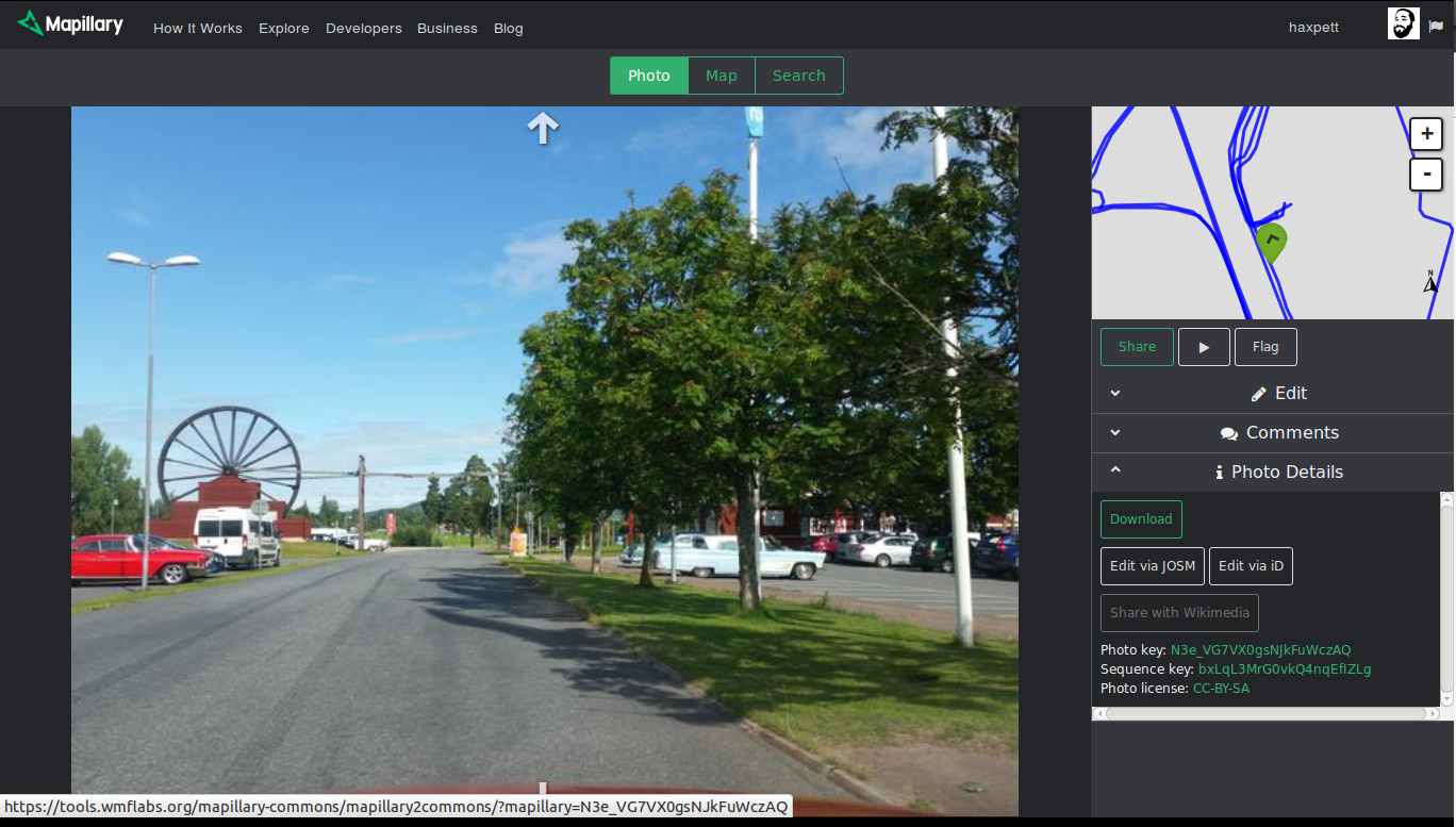 Skärmdump av Mapillarys gränsnitt. Bilden är tagen vid Hjultorget i Insjön i Dalarna, Sverige.